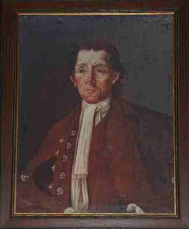 Lukas Kern (* 15. Oktober 1681 in Obernzell; † 12. September 1749 in Passau), ein deutscher Schiffsmeister, Wirt und Wohltäter, auf einem Ölbild in der Pfarrkirche in Grainet.